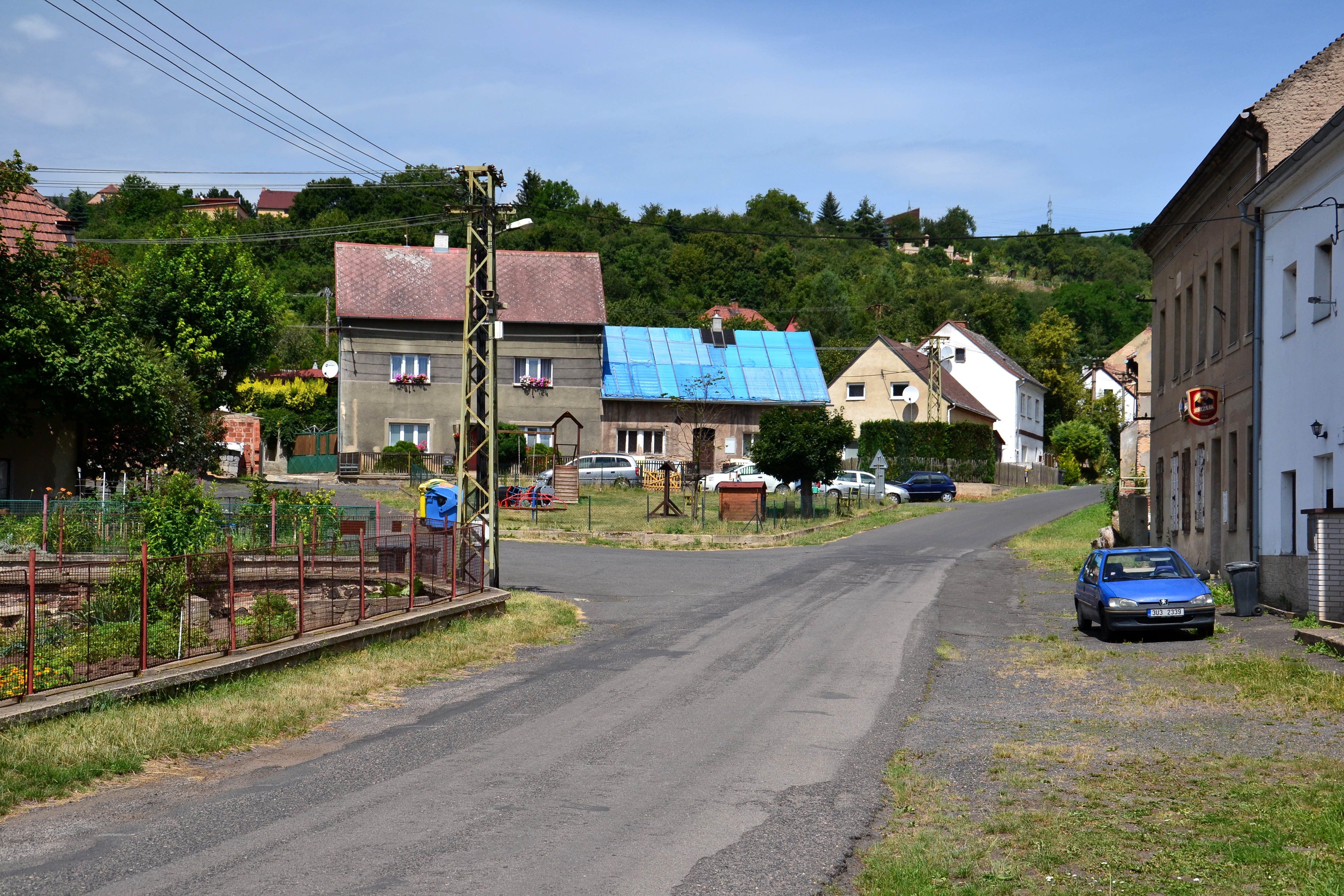 Náves